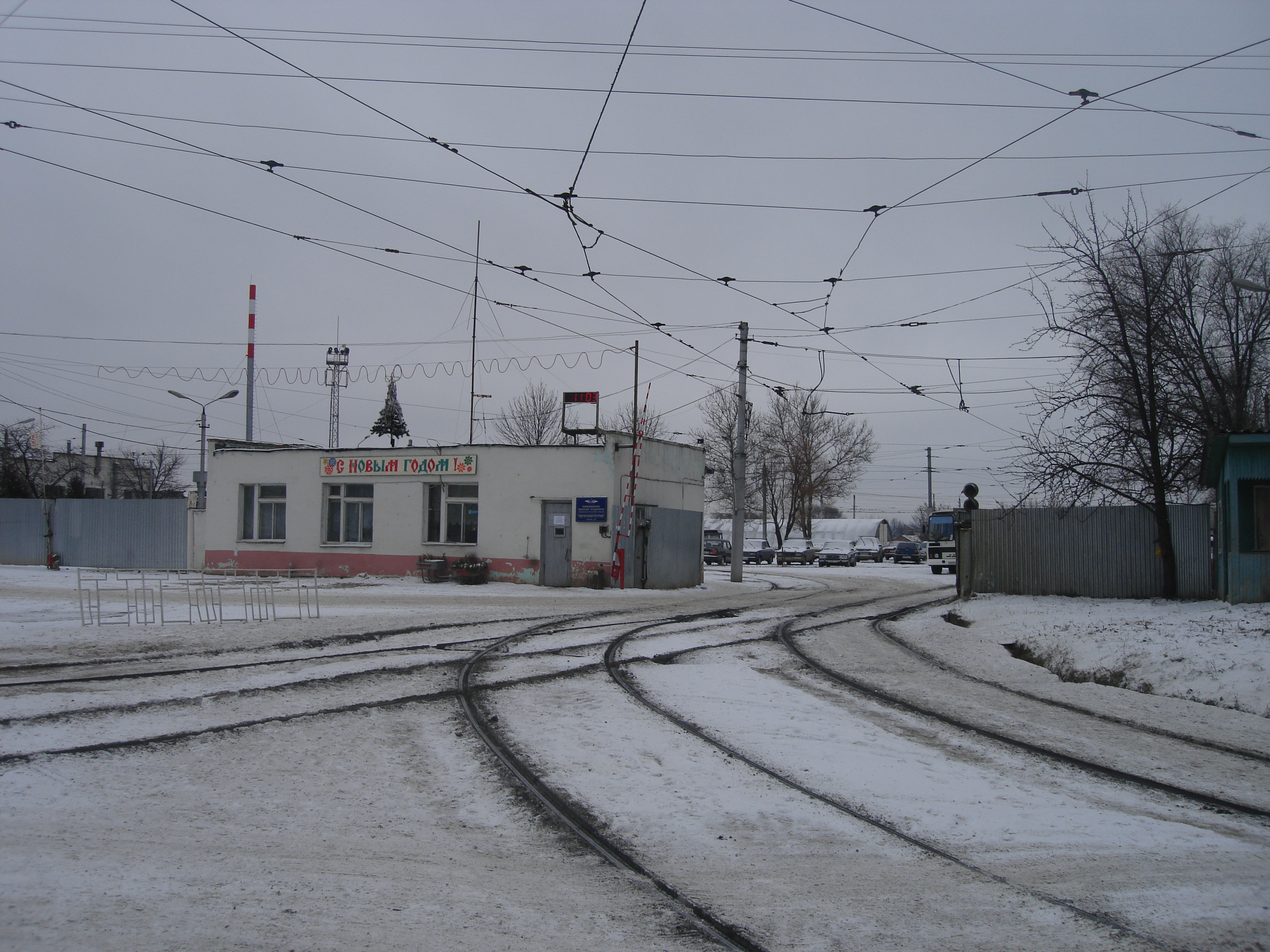 Съезды в депо на Ложевой